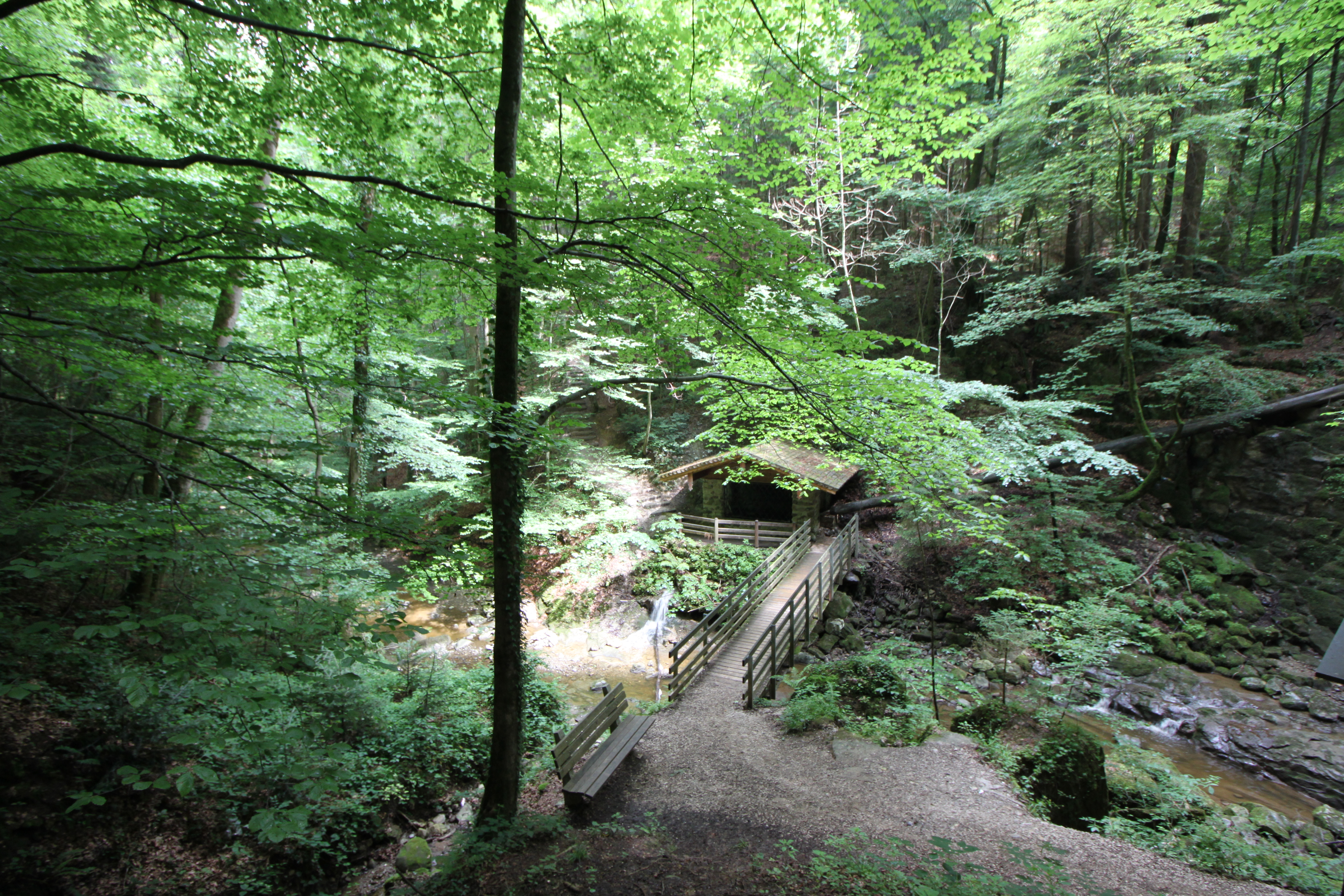 Kugelmühle rechts vom Teufelsgrabenbach unterhalb vom Wildkarwasserfall, Fußgängerbrücke zur Kugelmühle